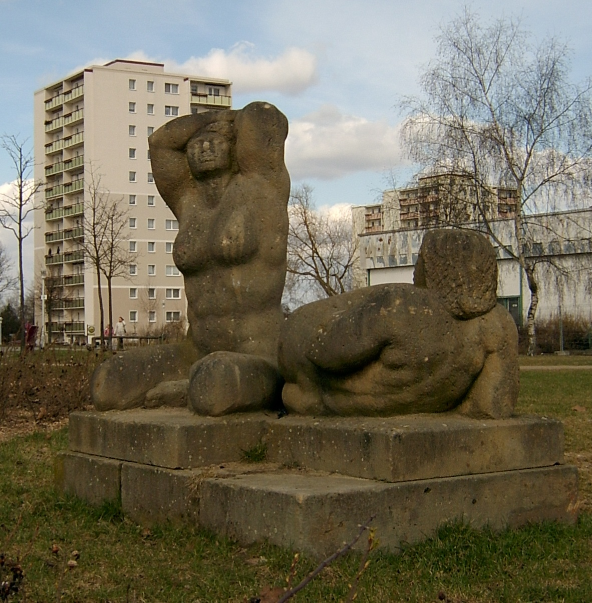 Skulptur in Frankfurt (Oder)